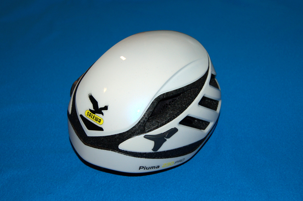 Caschetto utilizzato per alpinismo e vie ferrate. Marca Salewa